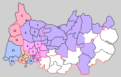 奈良県添下郡・平群郡（後の生駒郡）の町村制時点の町村。